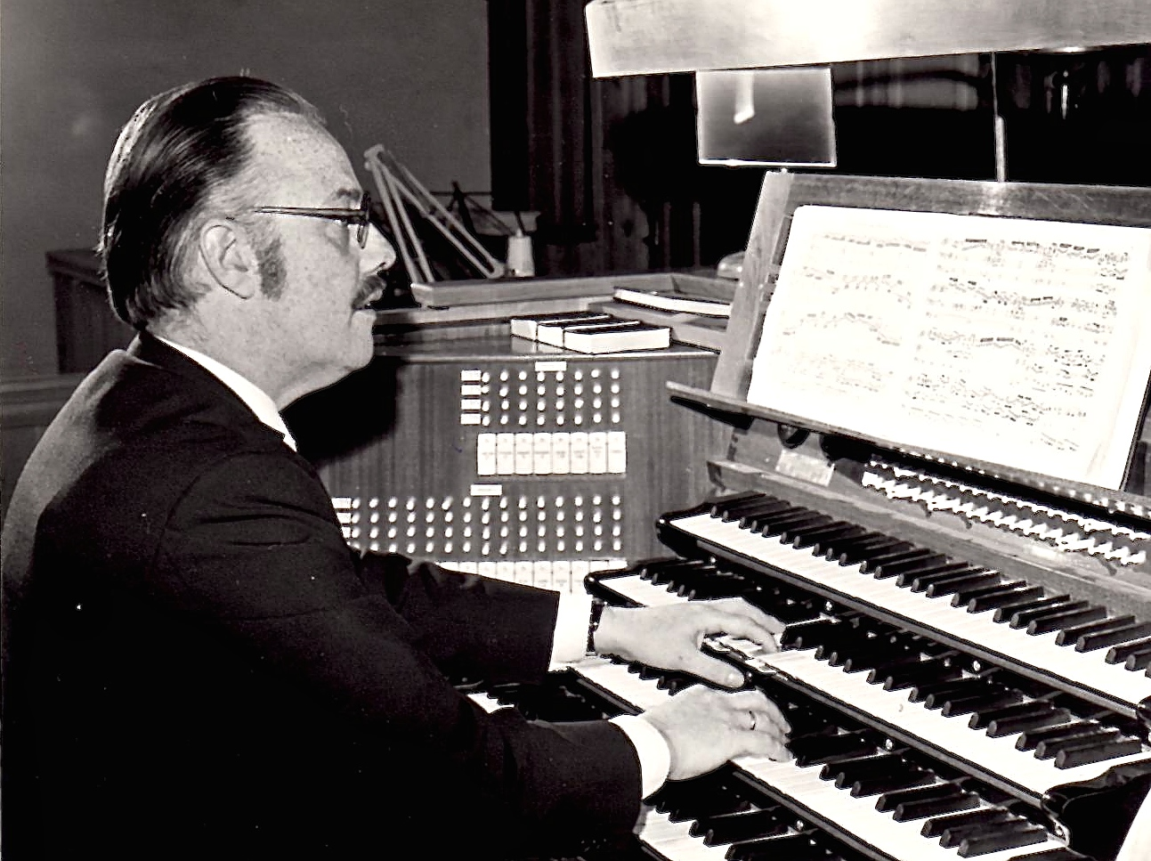 Ved orgelet i Bodø domkirke